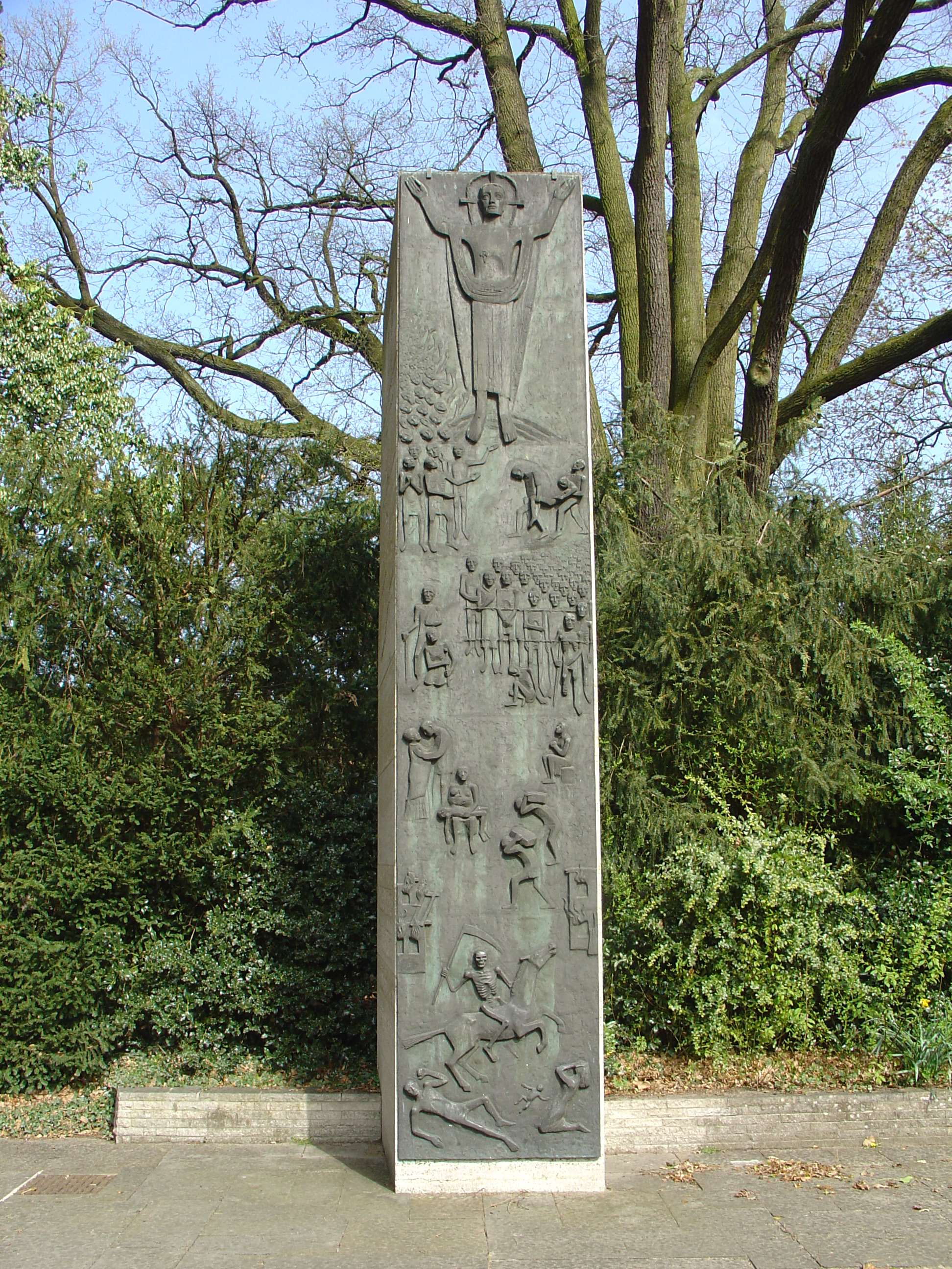 Ehrenmal zum Gedenken an die Gefallenen der Weltkriege in Harsewinkel